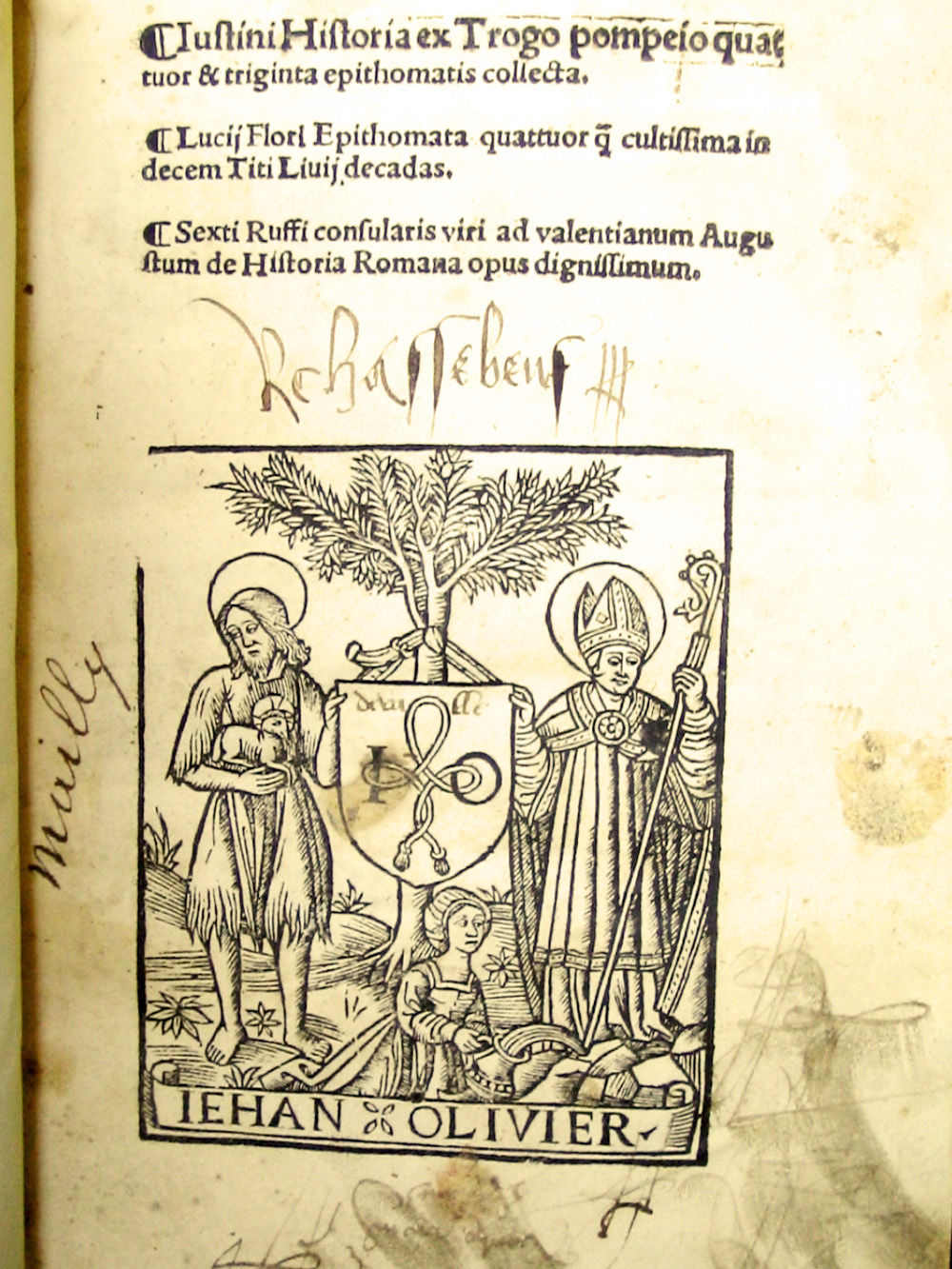 Extraits de l'Histoire de Trogue Pompée par Julien